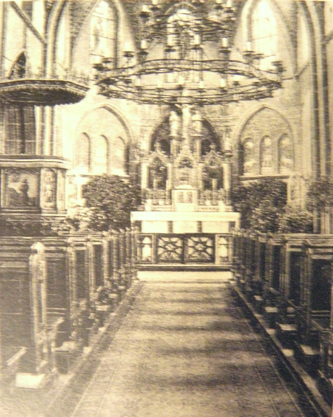 Kirche St. Peter und Paul, Eberswalde. Blick zum Hauptaltar. Foto um 1910